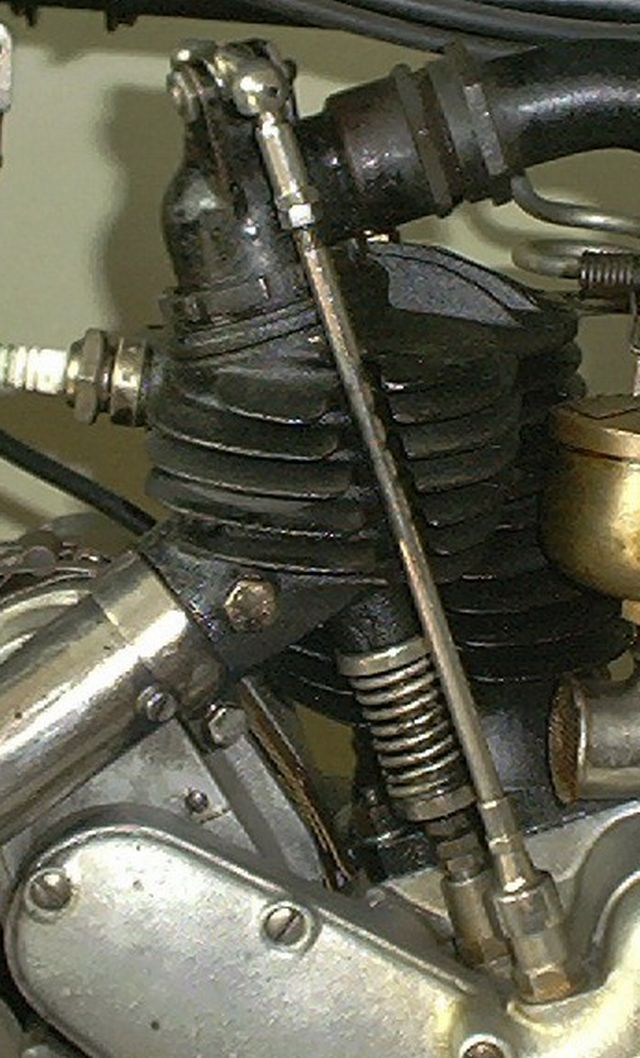 Außenliegende Stößelstange an einen IOE-Motor, eigenes Bild, GFDL